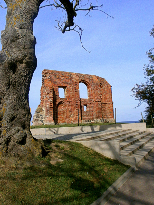 Trzęsacz, ruiny kościoła